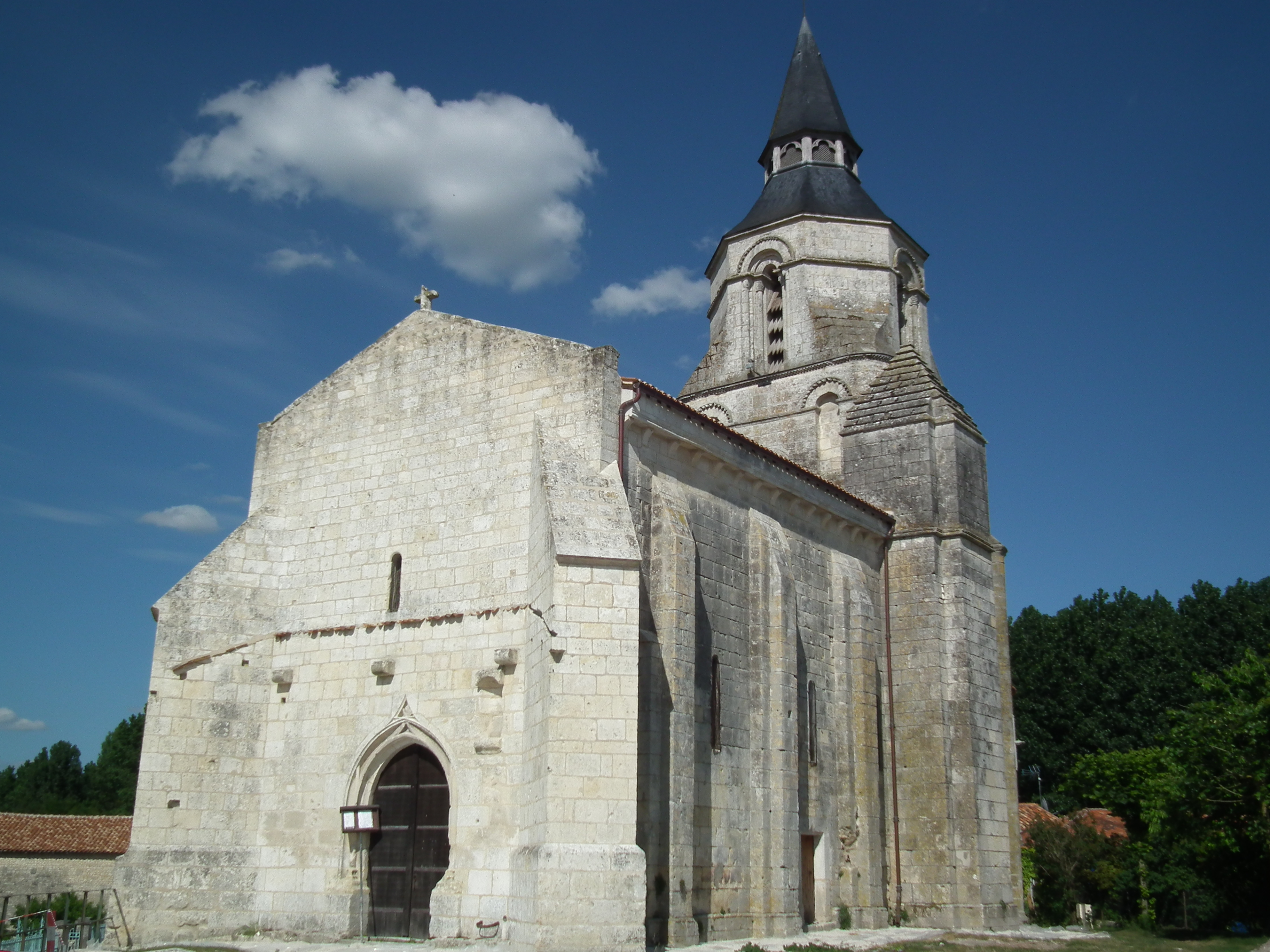 L'église de Colombiers